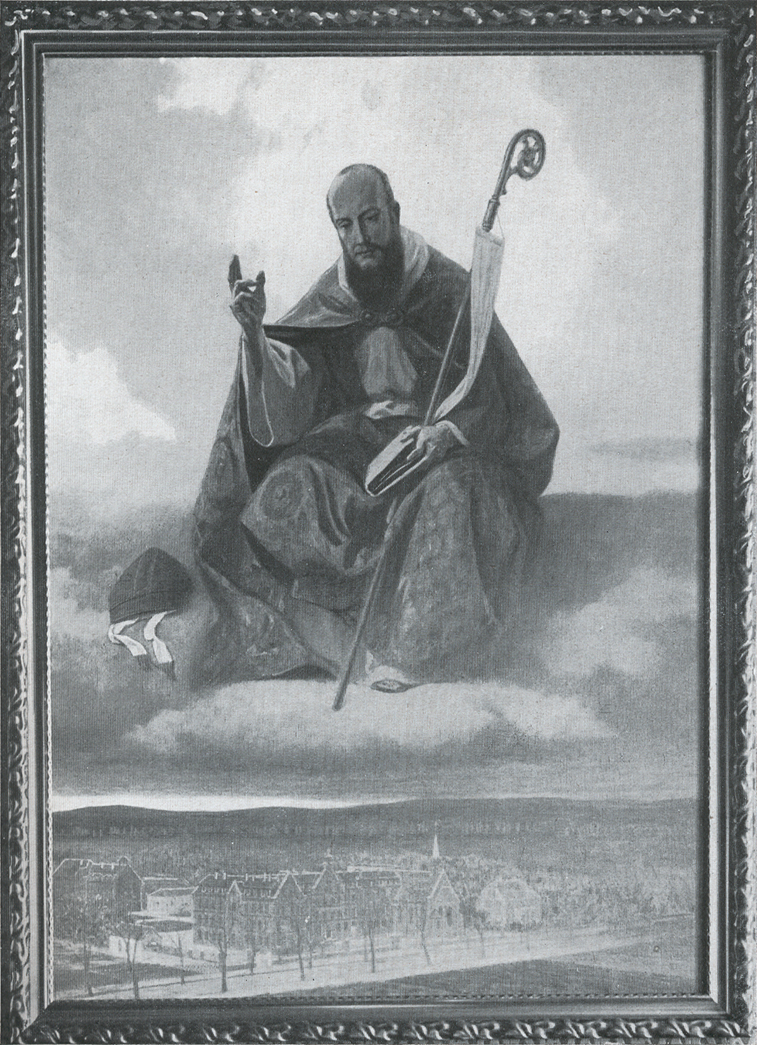 Der Namenspatron Franz von Sales dargestellt über der nach ihm bennanten Einrichtung, dem Franz Sales Haus in Essen.